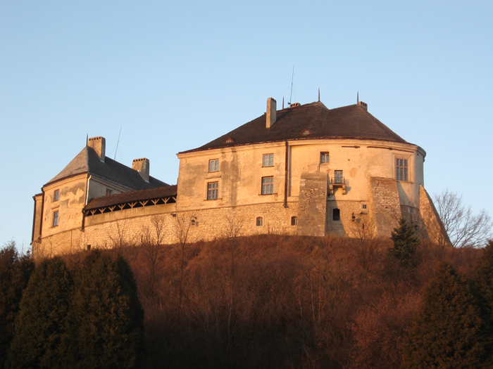 Вид на Олесский замок